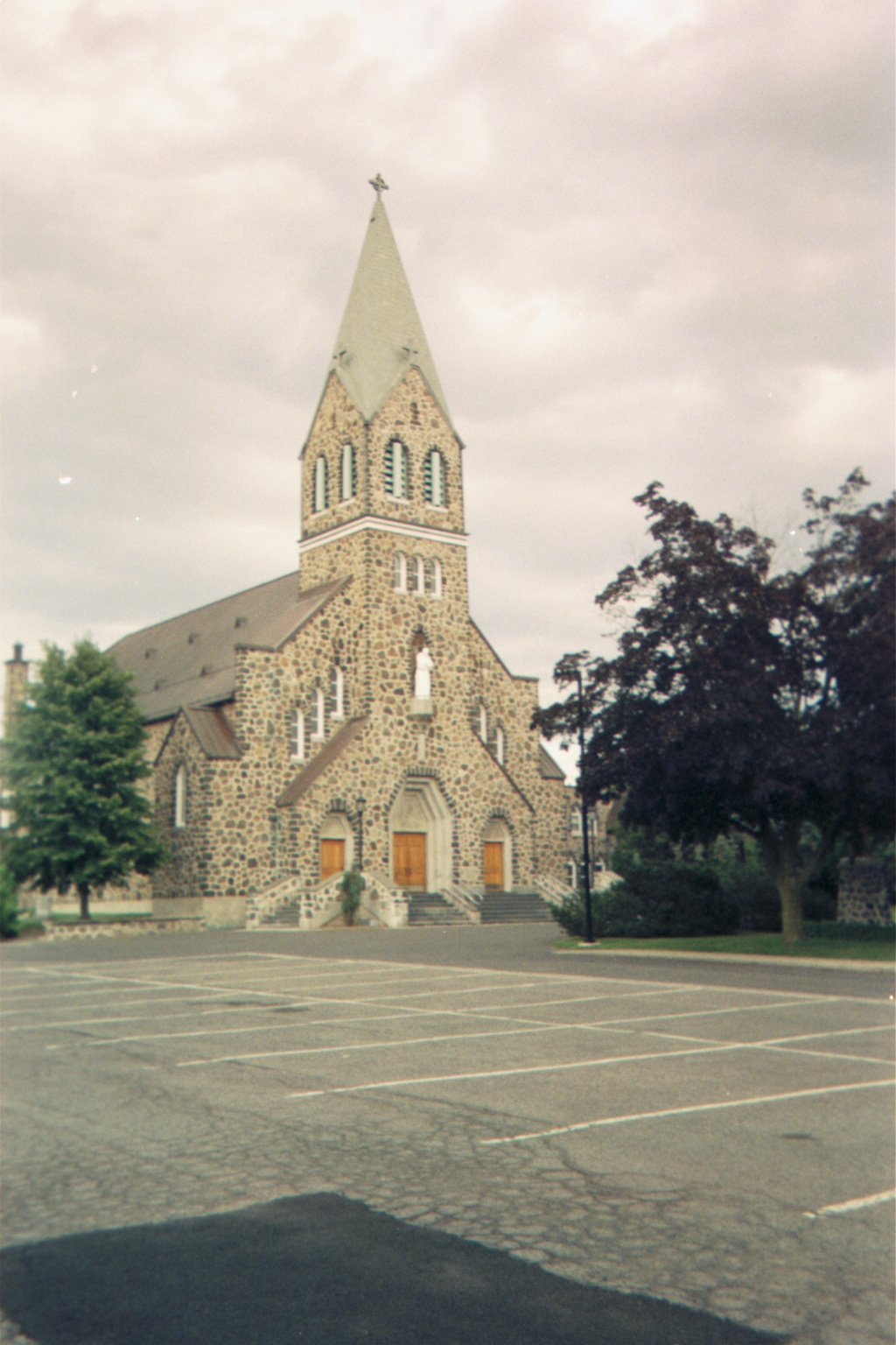 Église catholique de Saint-Bruno-de-Montarville, sur la rue Montarville.